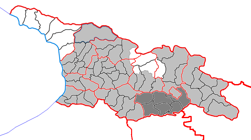 Квемо-Картли на административной карте Грузии